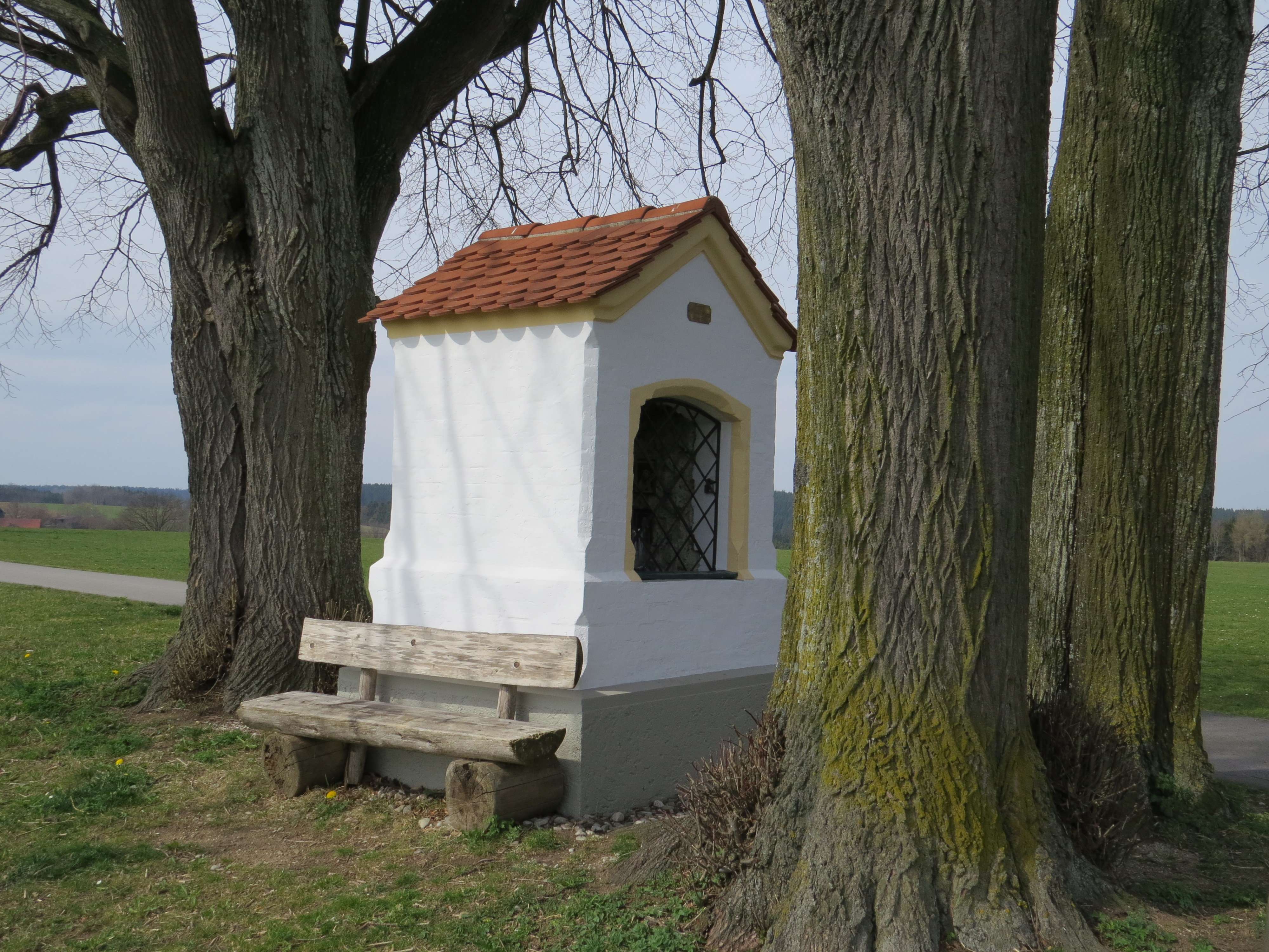 Bildstockkapelle Alpenstr. in Denklingen